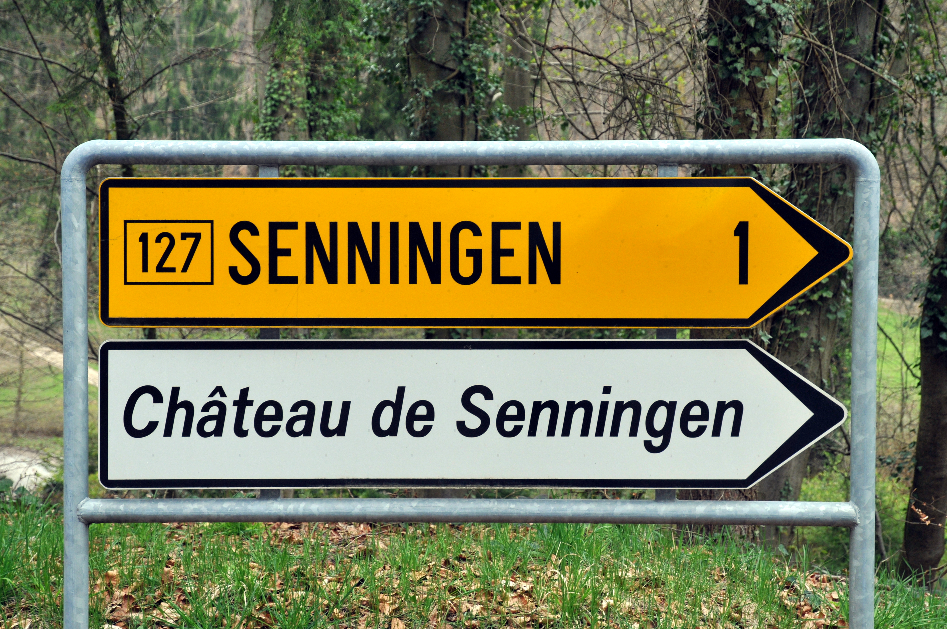 D'Ofzweigung vun der N1 bei d'Sennenger Schlass.